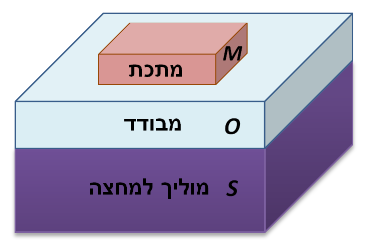 מבנה סכמטי של קבל MOS